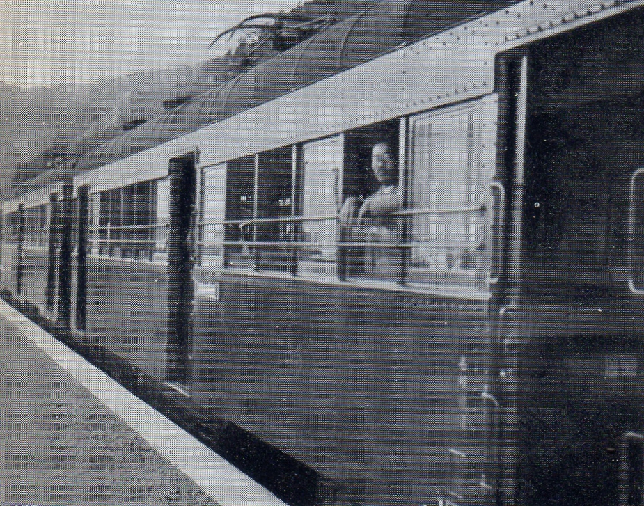 下呂駅に到着した名古屋鉄道デセホ700形